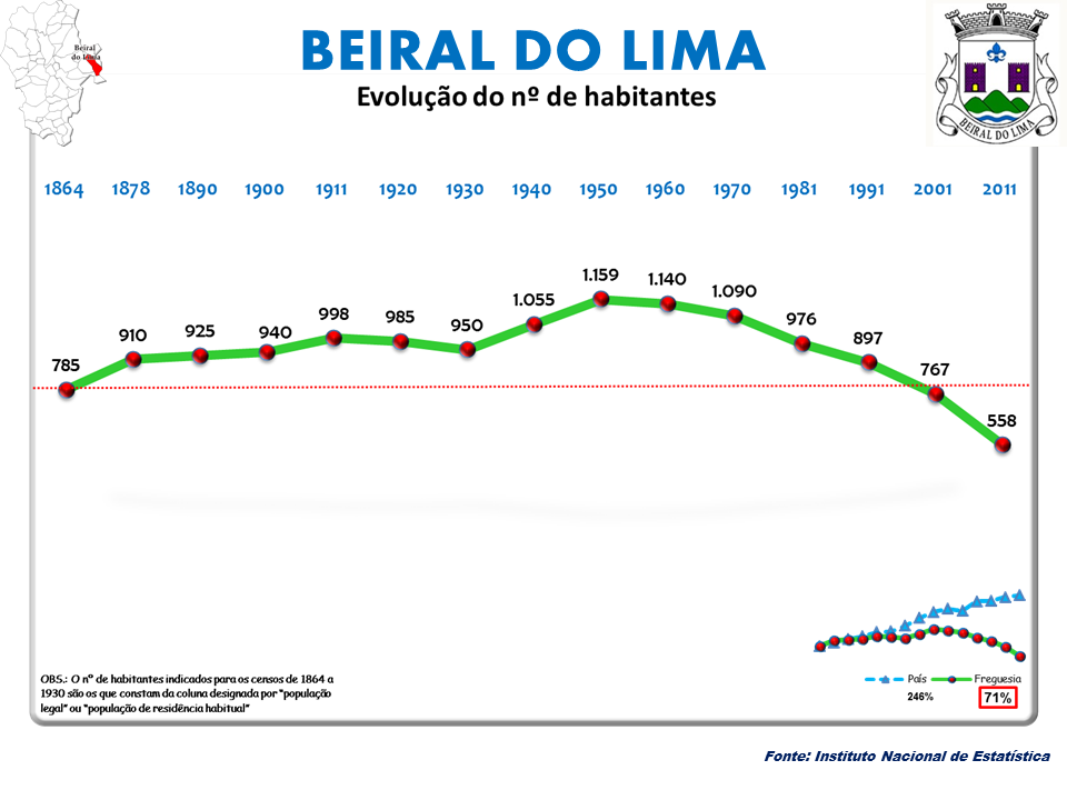 Censos 1864/2011